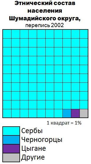 Этнический состав населения Шумадийского округа (Сербия)